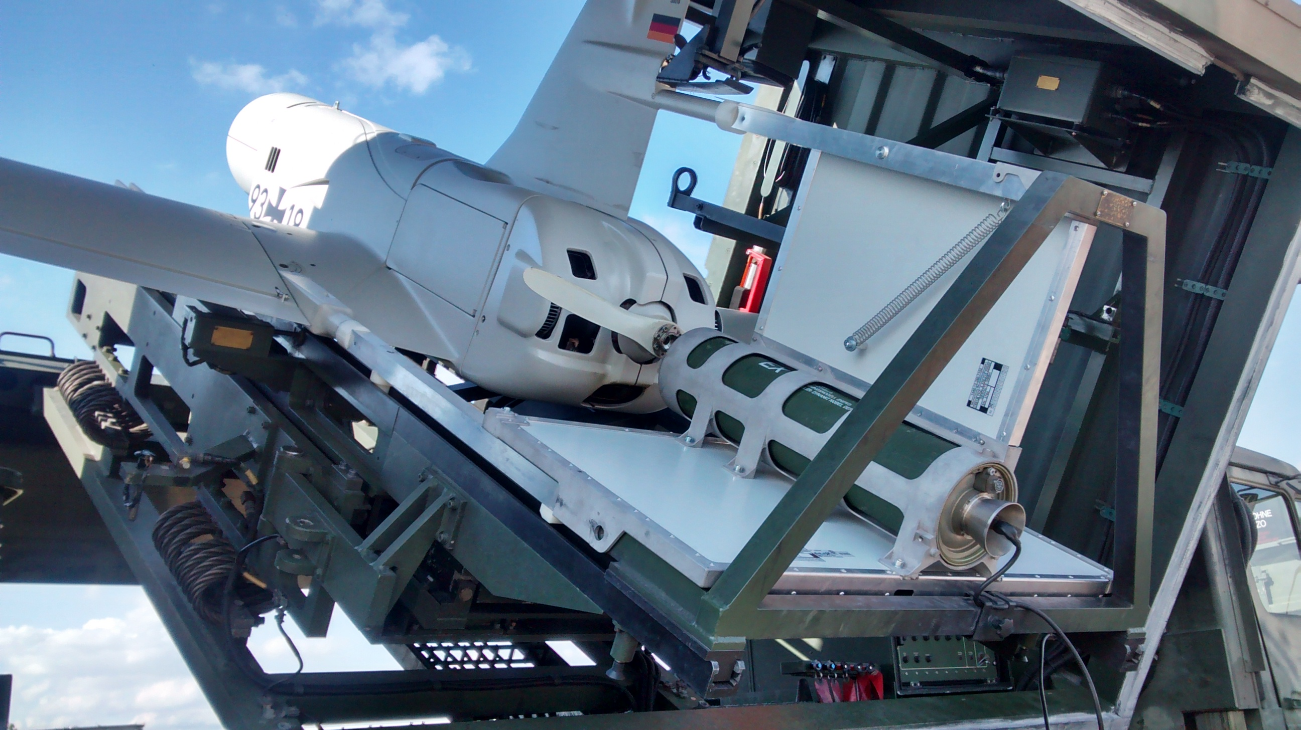 KZO auf Abschussrampe